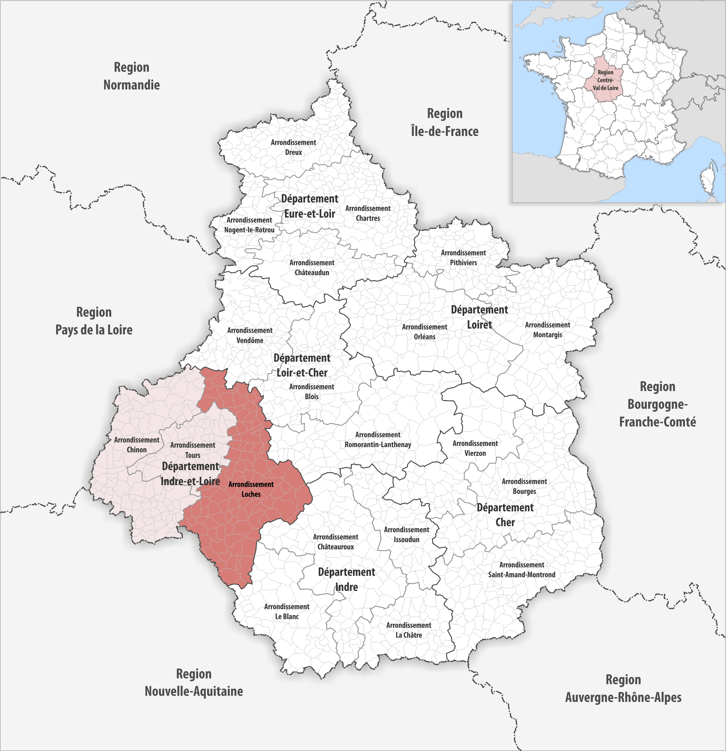 Lage des Arrondissements Loches